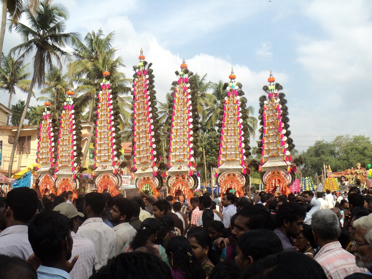 കൊടകര ഷഷ്ഠിയുടെ ഭാഗമായി കാവടി സെറ്റുകൾ പൂനിലാർക്കാവ് ദേവീക്ഷേത്രത്തിൽ എത്തിച്ചേർന്നപ്പോൾ.